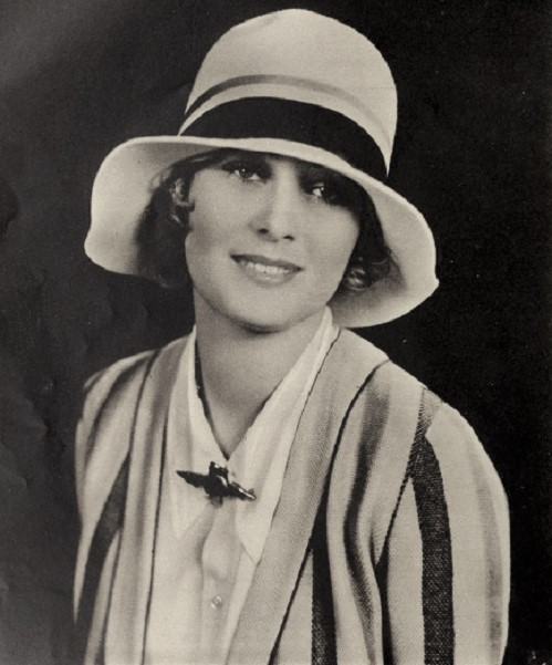 Dolores Costello